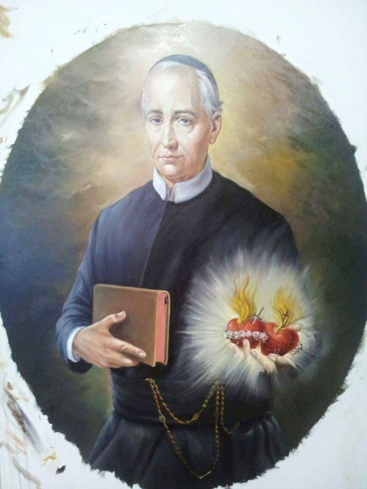 Imagen de San Cayetano Errico.